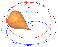 Locuskurve des aufrechten Kreisels im instabilen Fall.